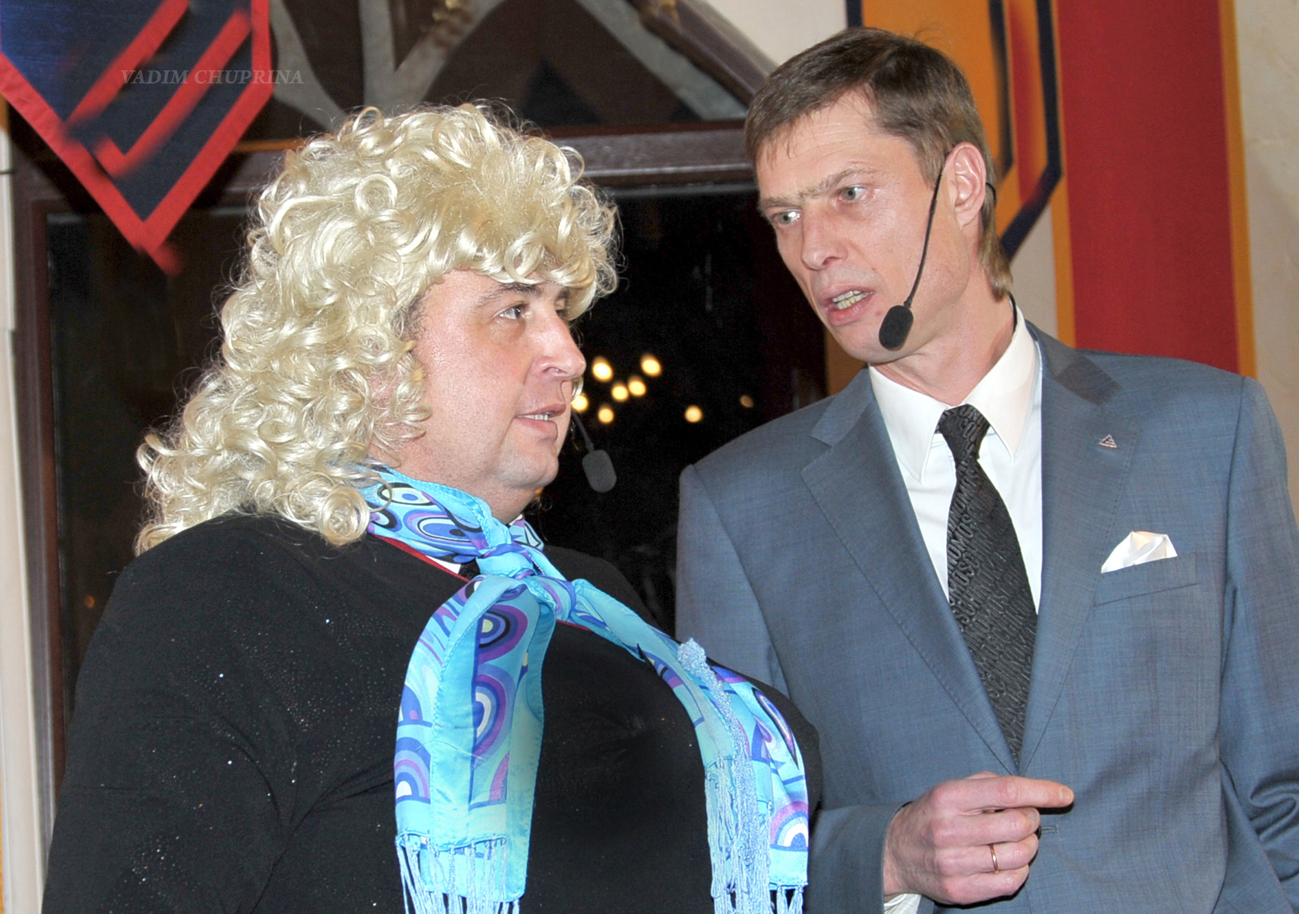 Данилец Владимир и Моисеенко Владимир , фото Чуприна Вадим. А